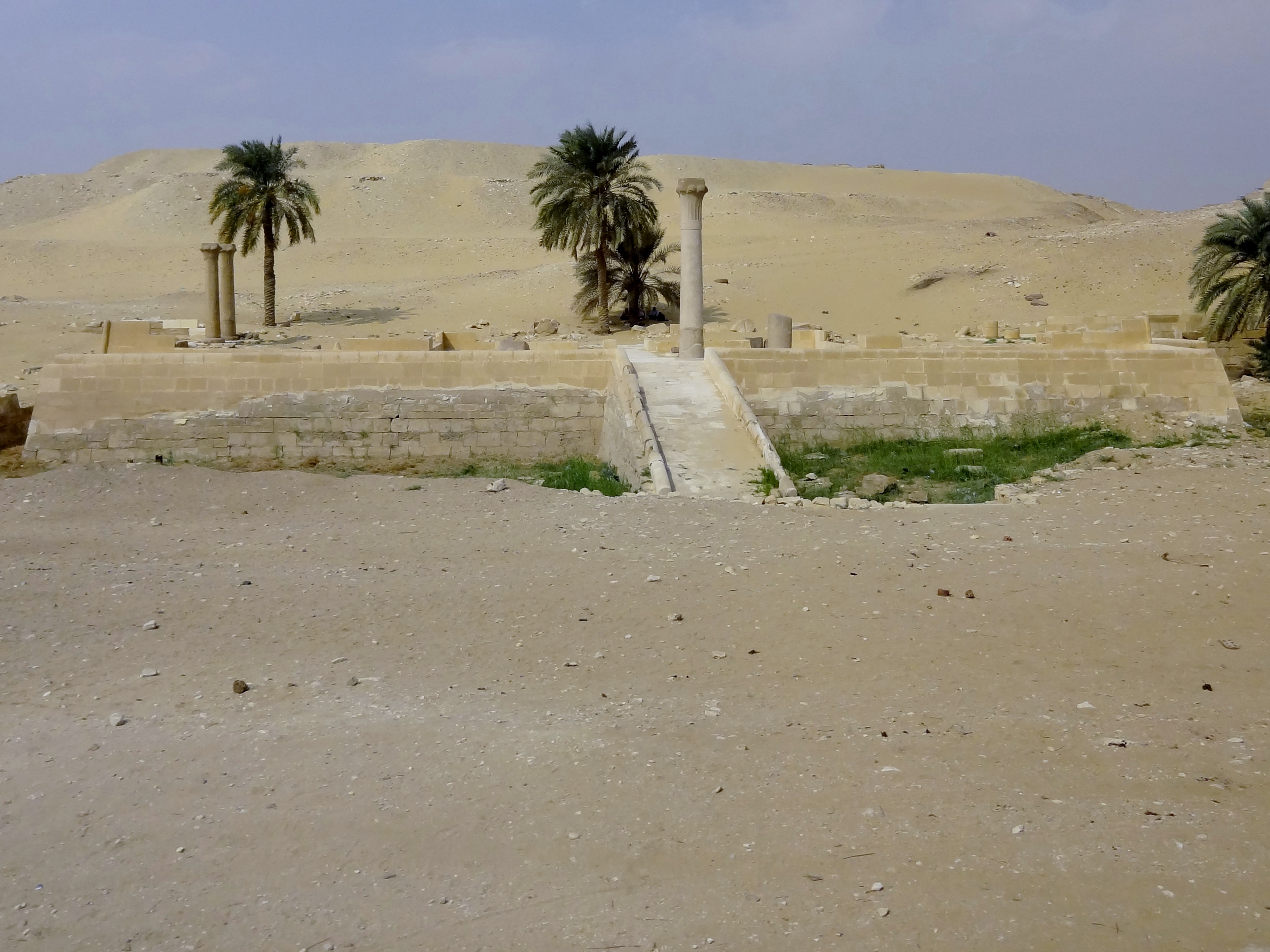 Taltempel der Unas-Pyramide in Sakkara, Ägypten